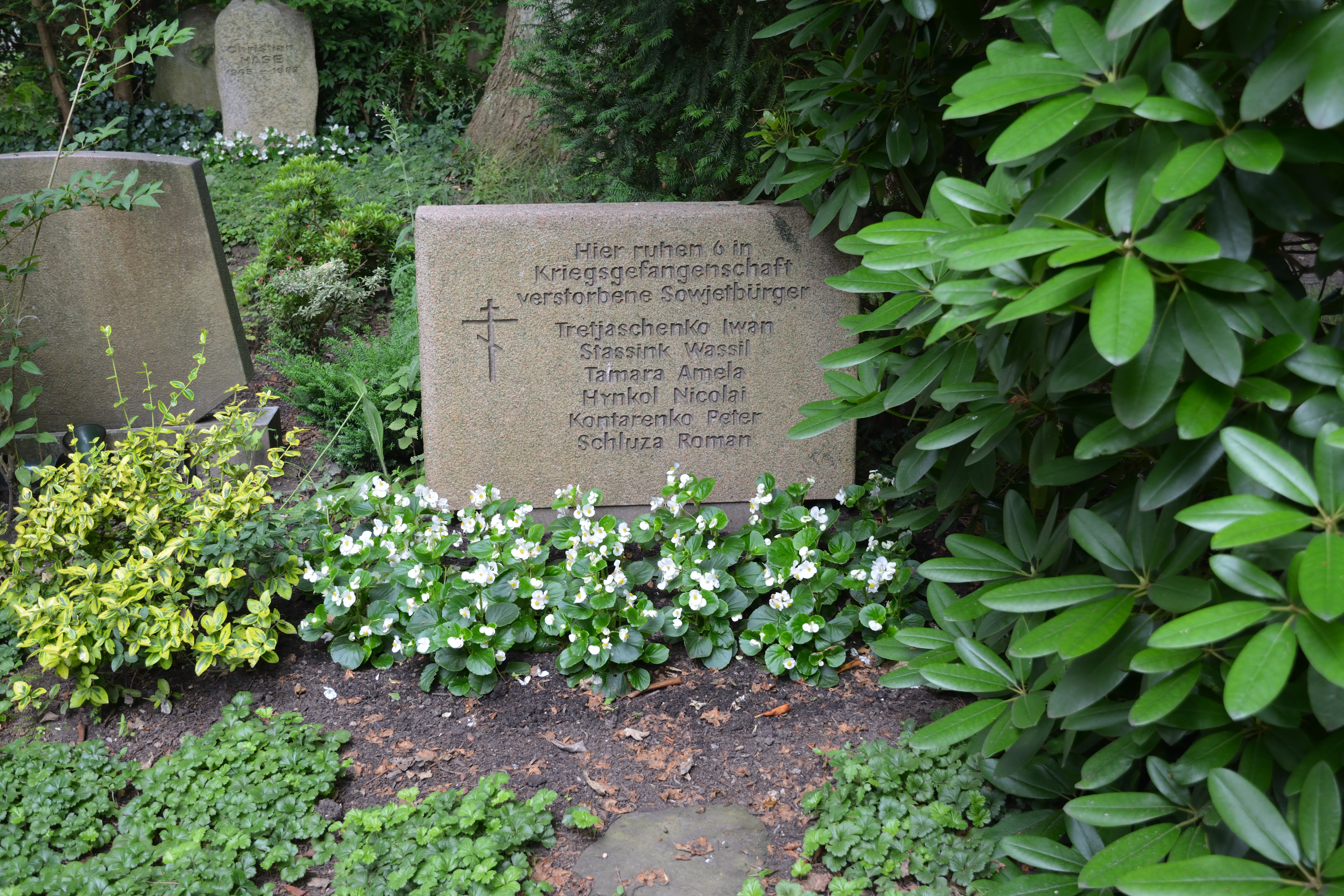 Kriegsgräber auf dem Friedhof von Flintbek